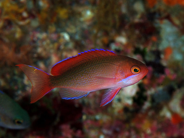 カシワハナダイyg Pseudanthias cooperi